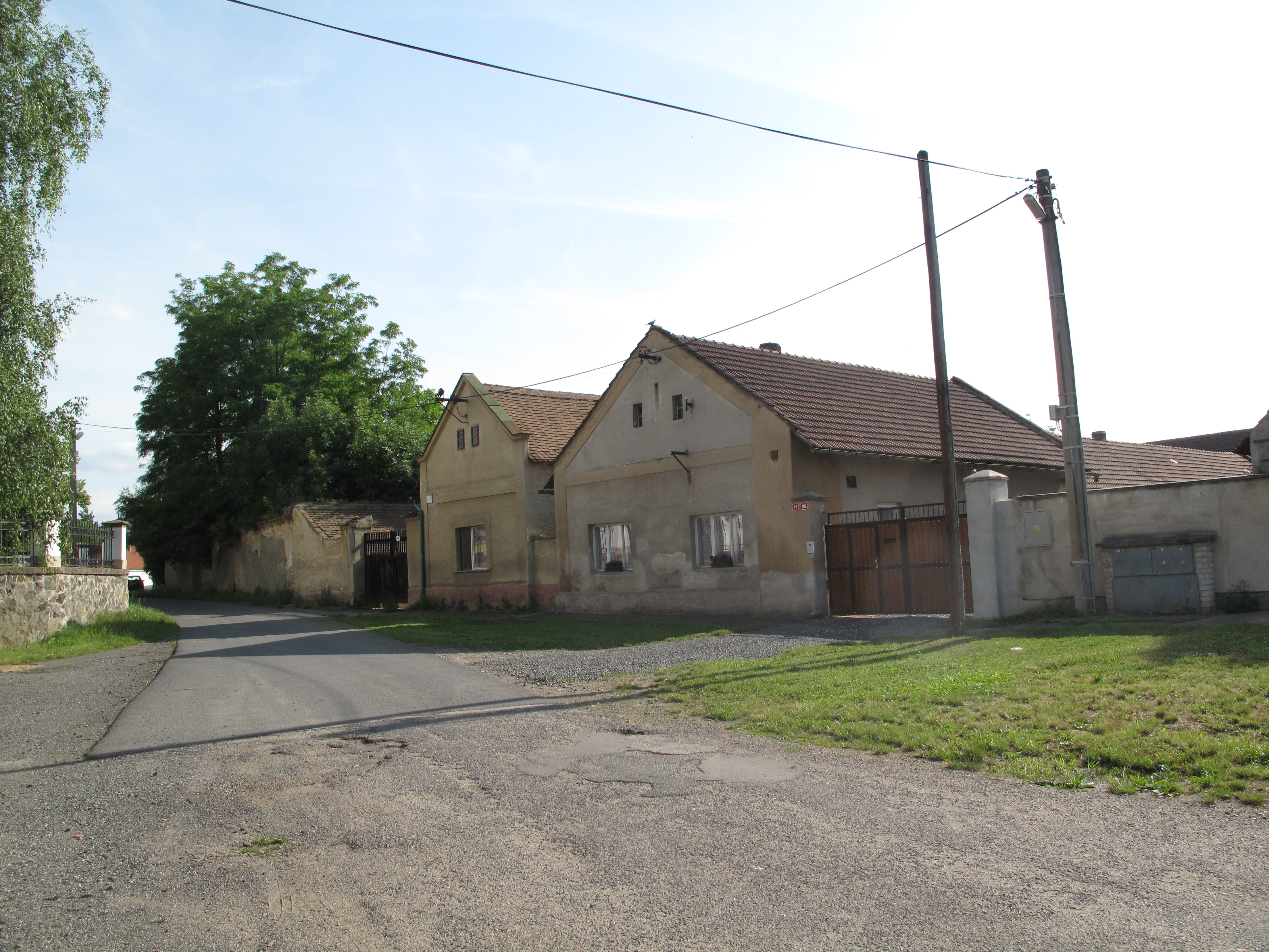 Veliká Ves